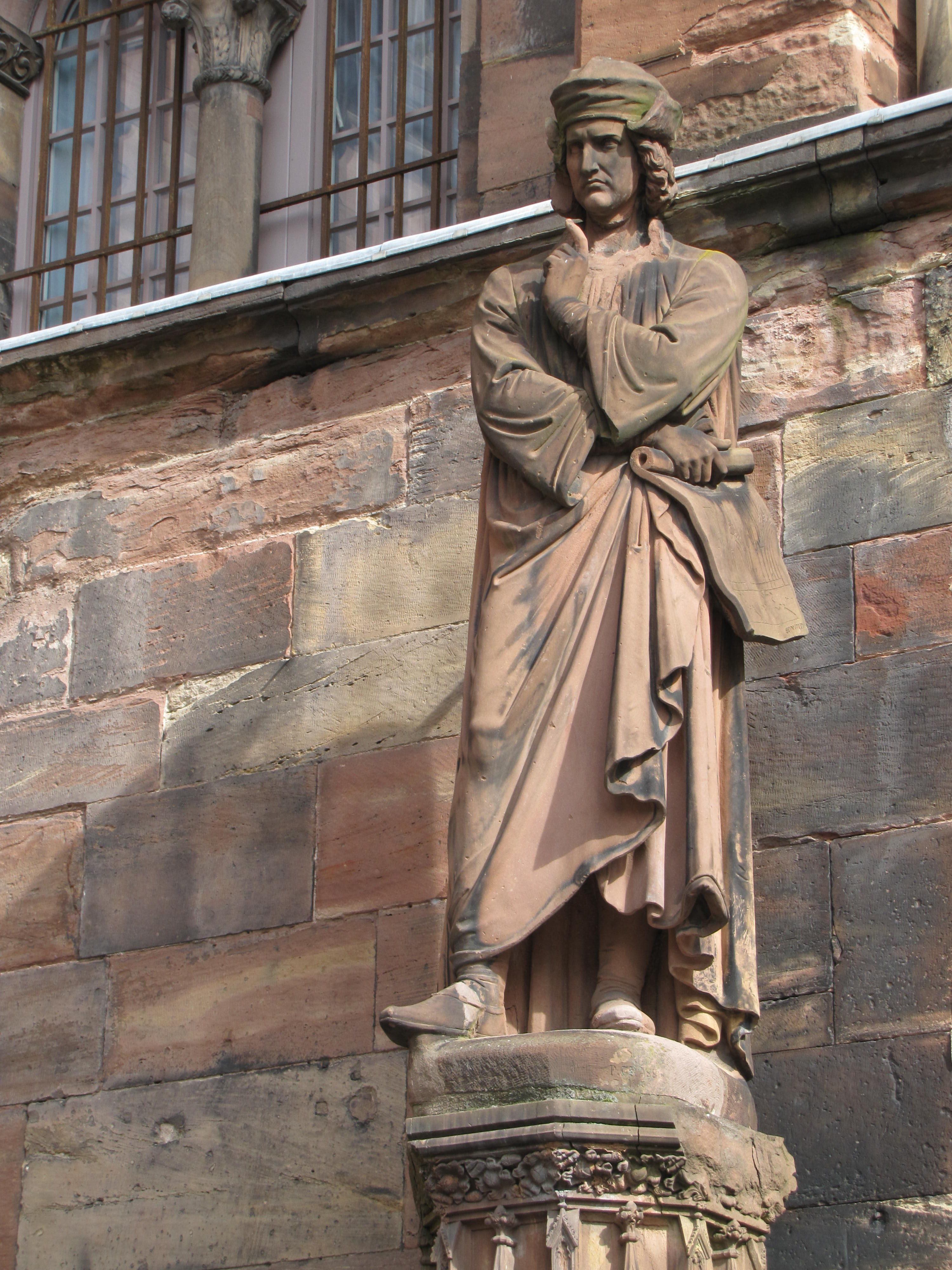 Alsace, Bas-Rhin, Cathédrale Notre-Dame de Strasbourg (PA00085015). Portail du transept sud, Statue de l'architecte Erwin von Steinbach (XIXe)